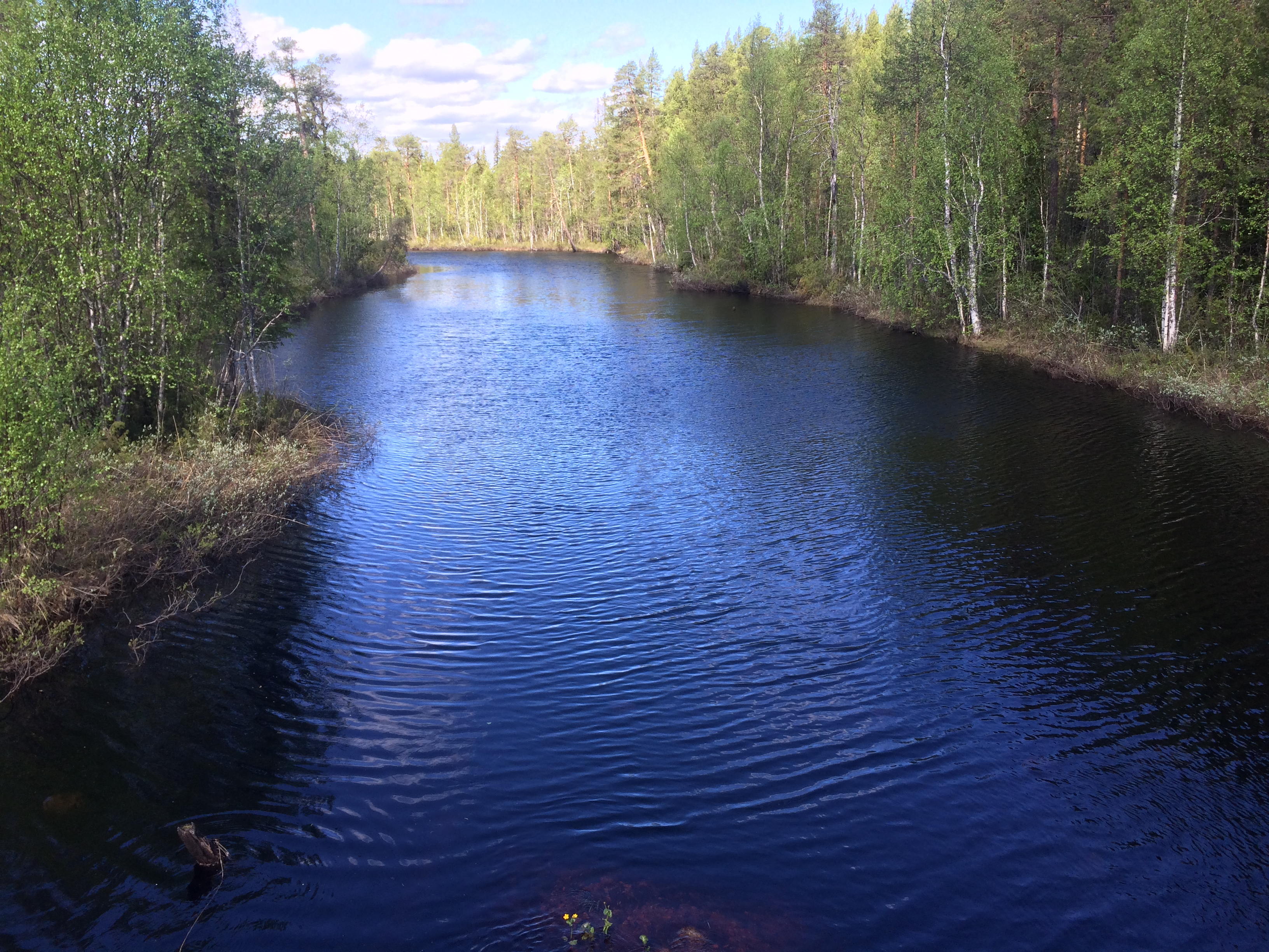 река Пулома